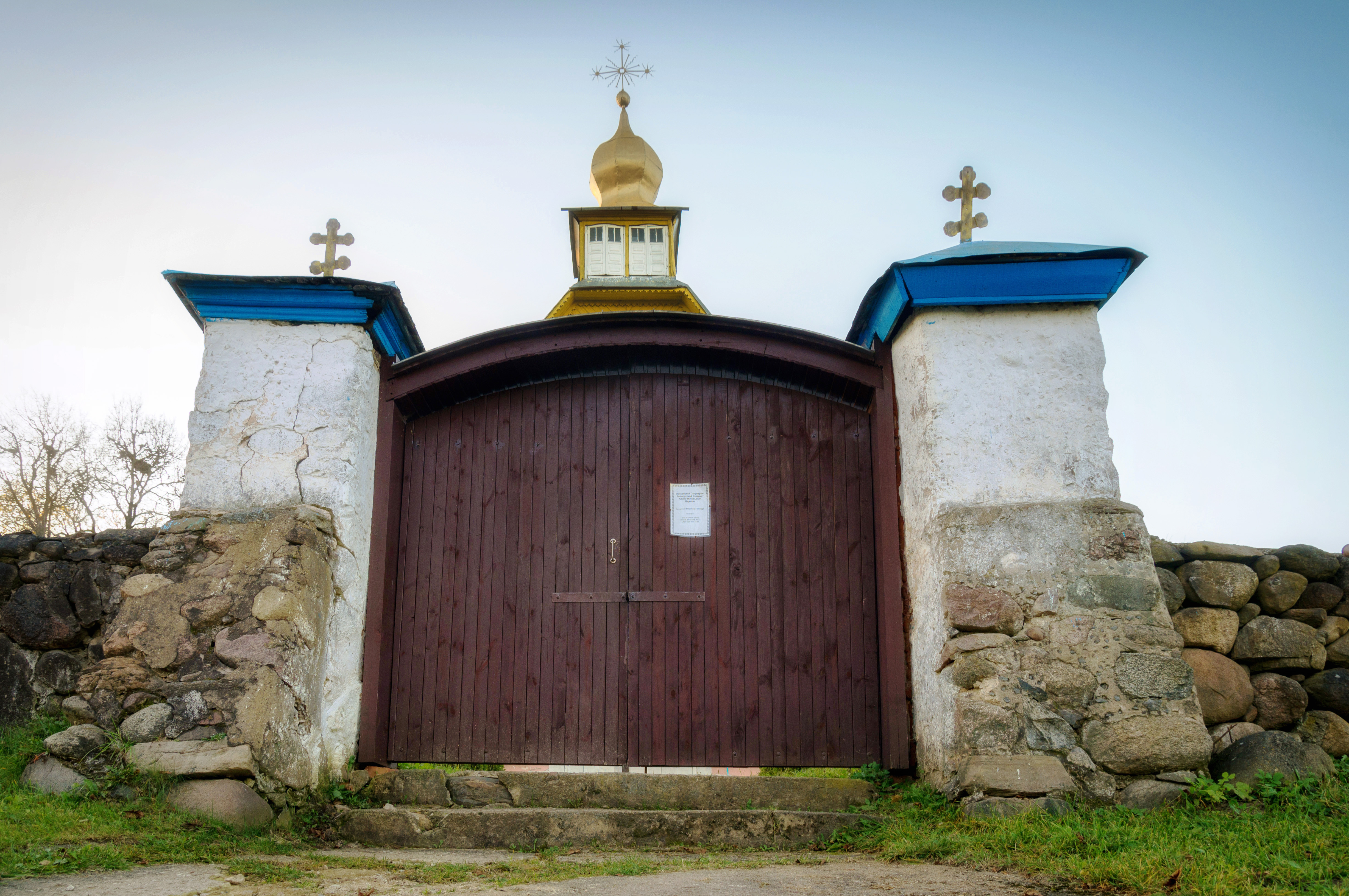 Свята-Мікалаеўская царква (Латыгаль)